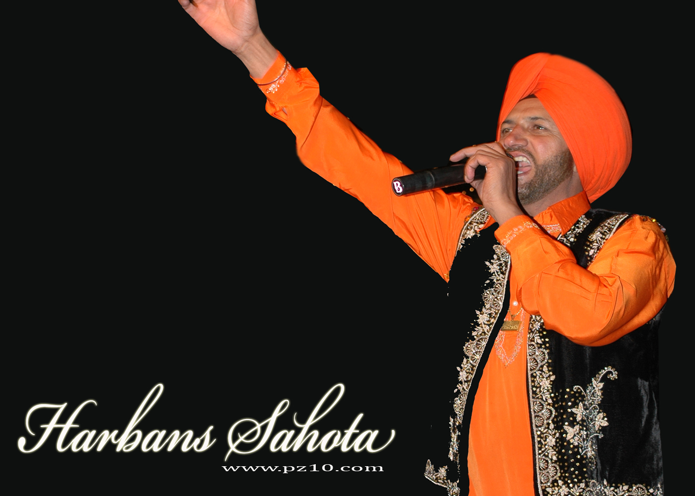 Harbans Sahota